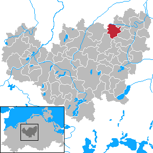 Walkendorf in Mecklenburg-Vorpommern - District Güstrow